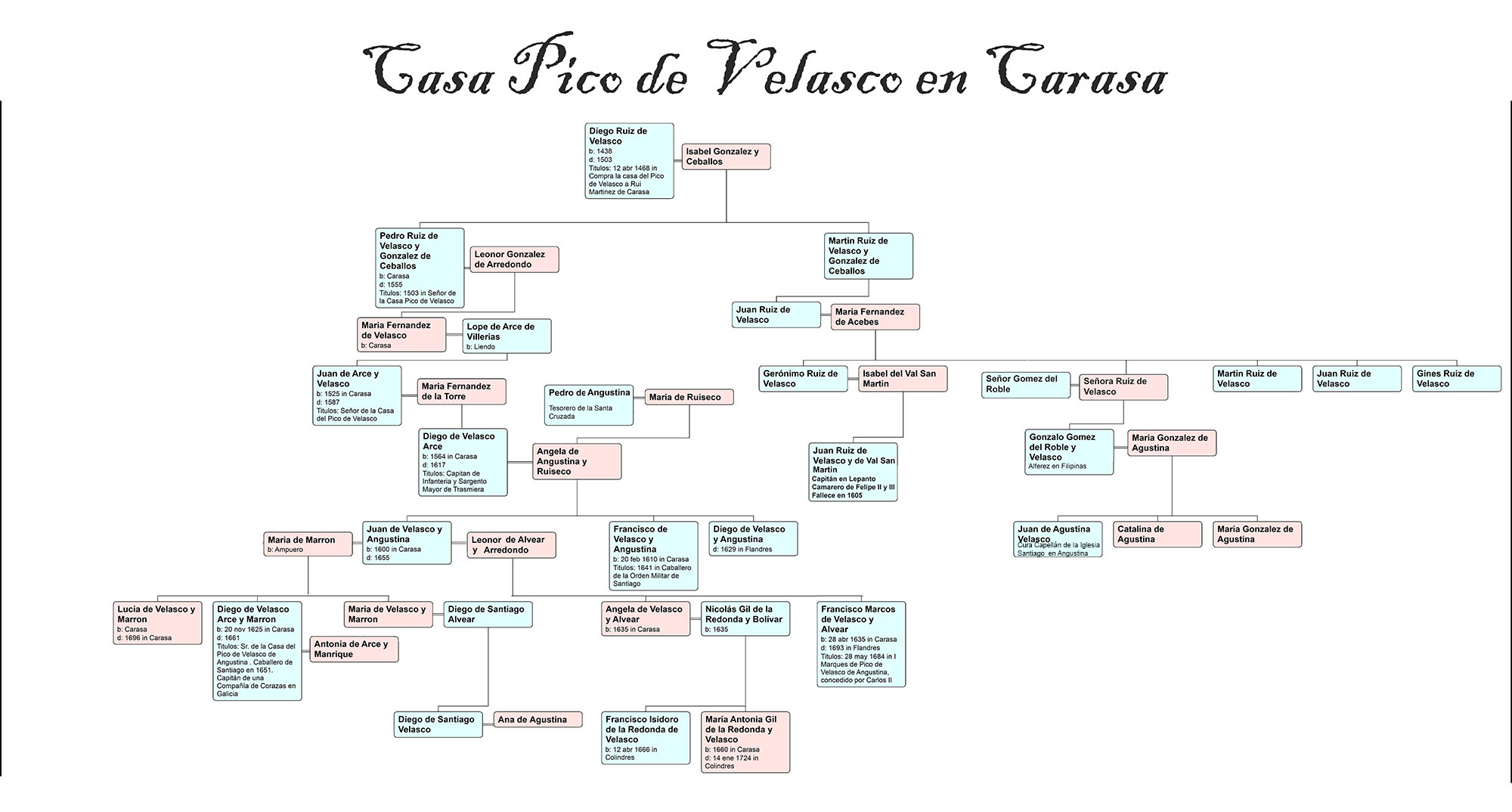 Arbol genealogico de la Casa Pico Velasco en Angustina, Carasa